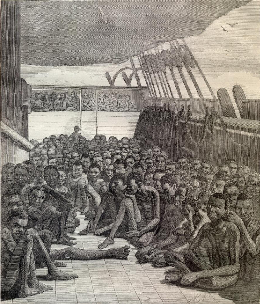 Barco en el que se transportan negros para su venta en Europa y América